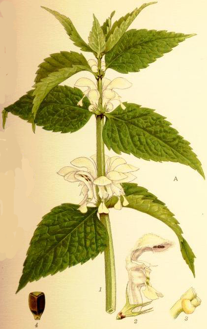 Vitplister (Lamium album) toppen av blommande stjälk, blomma från höger sida (2/1), det fyrdelade fruktämnet och den glaktiga honungskörteln (7/1), en delfrukt (5/1).